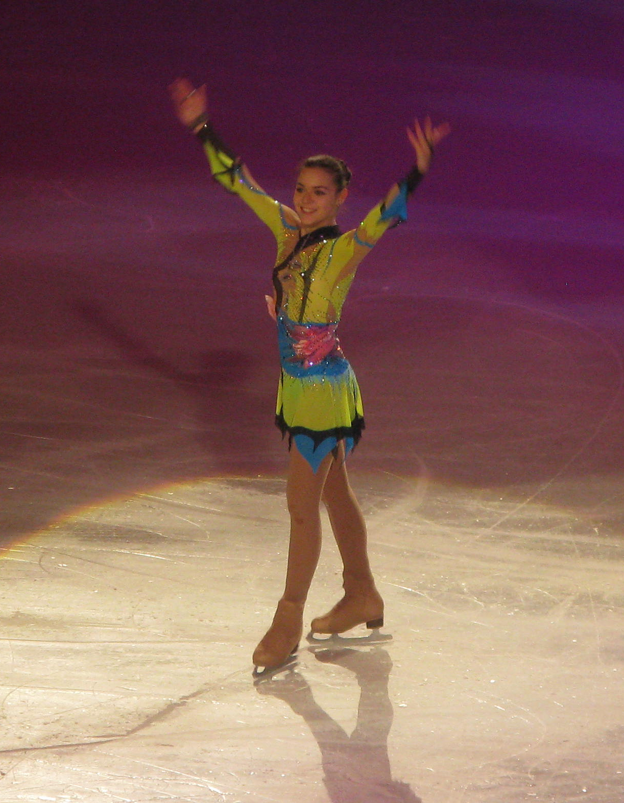 Adelina Sotnikova lors du gala du trophée Éric Bompard 2013 à Paris-Bercy.